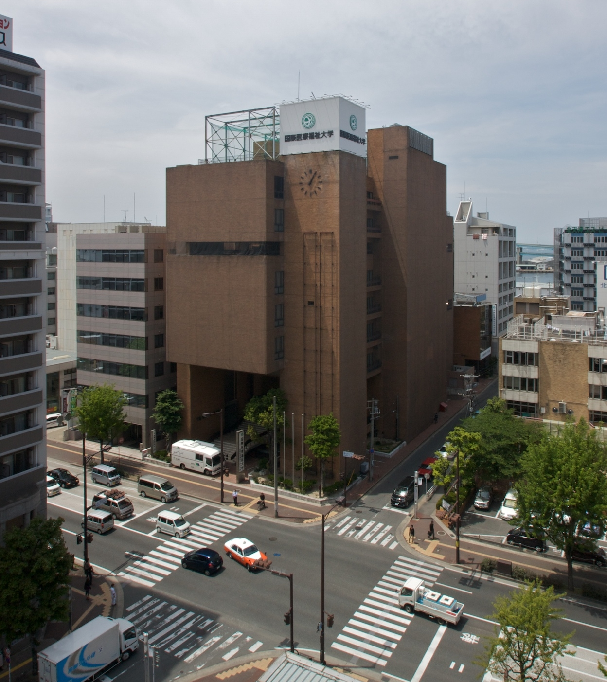 水城学園 (現 福岡国際医療福祉大学) 1974年。1998年まで水城学園。2014年解体。